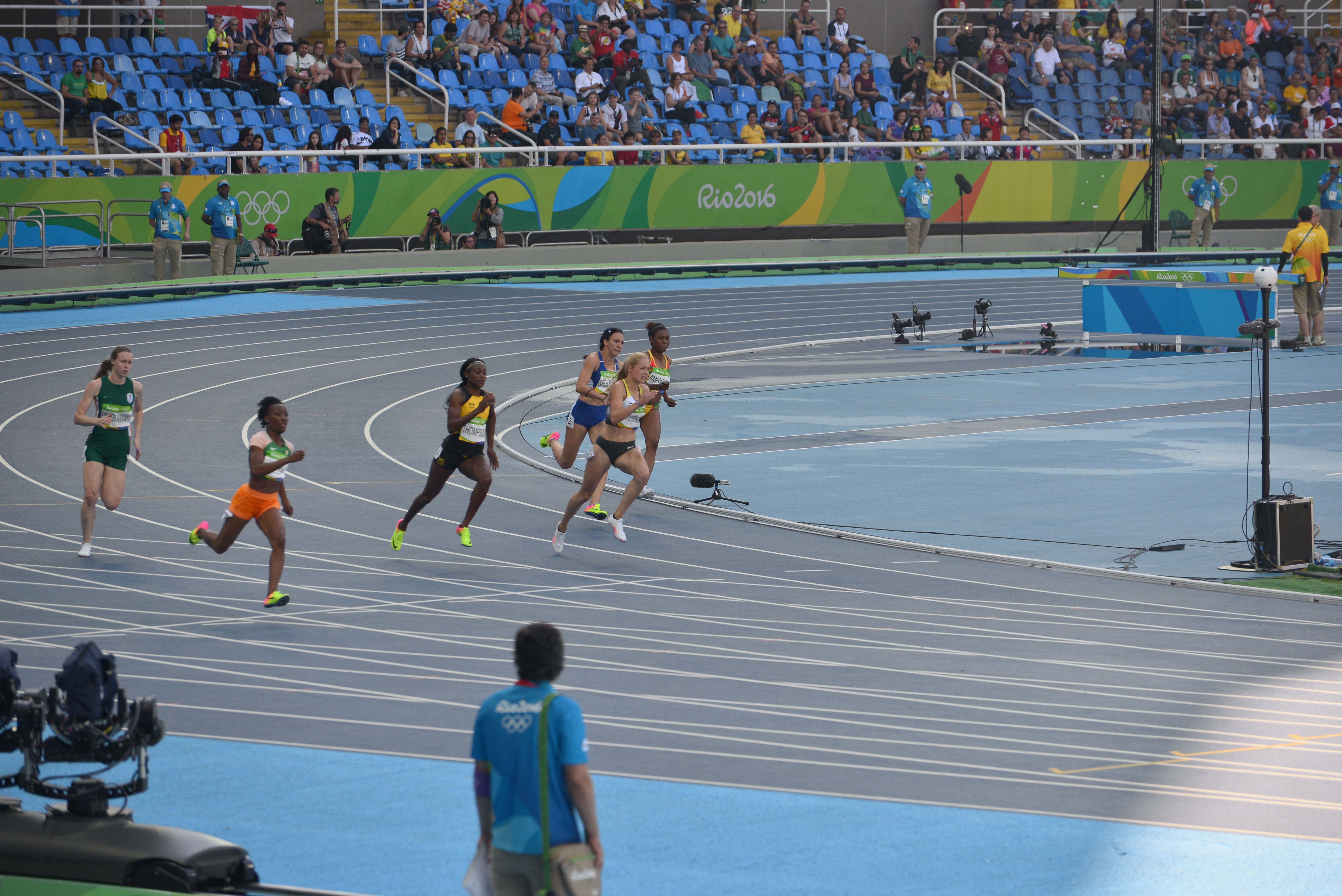 4ème Série du 200m féminin de Rio 2016